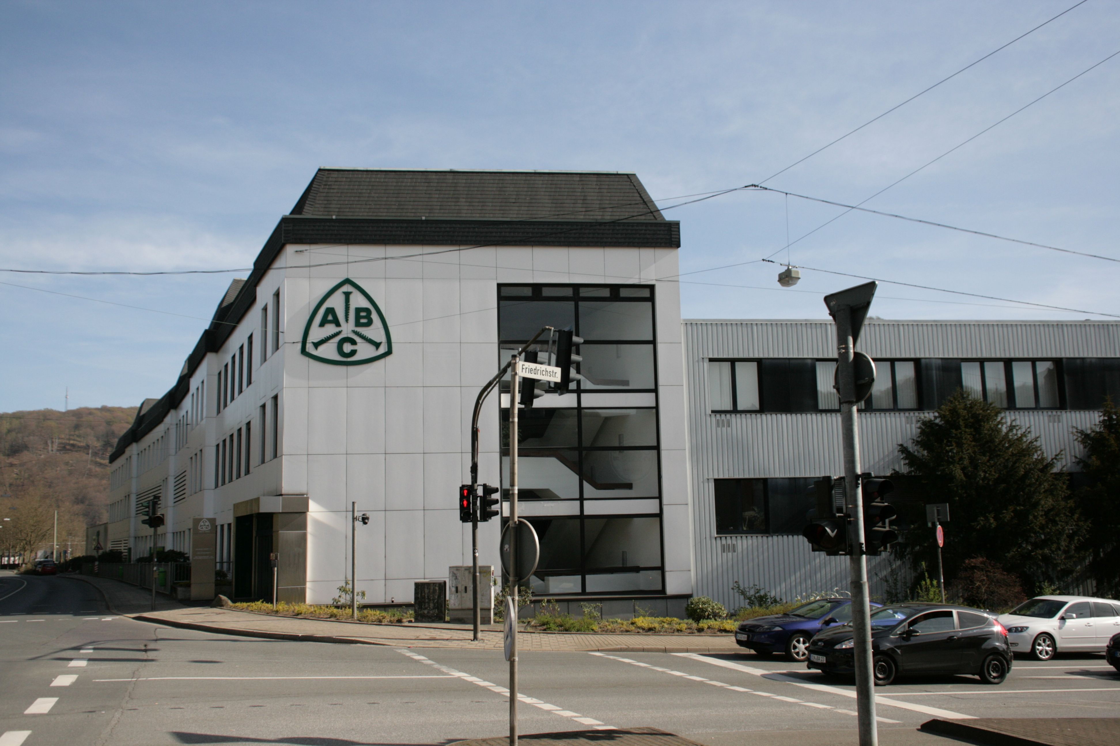 Altenloh, Brinck & Co, Kölner Straße 71-77 in Ennepetal